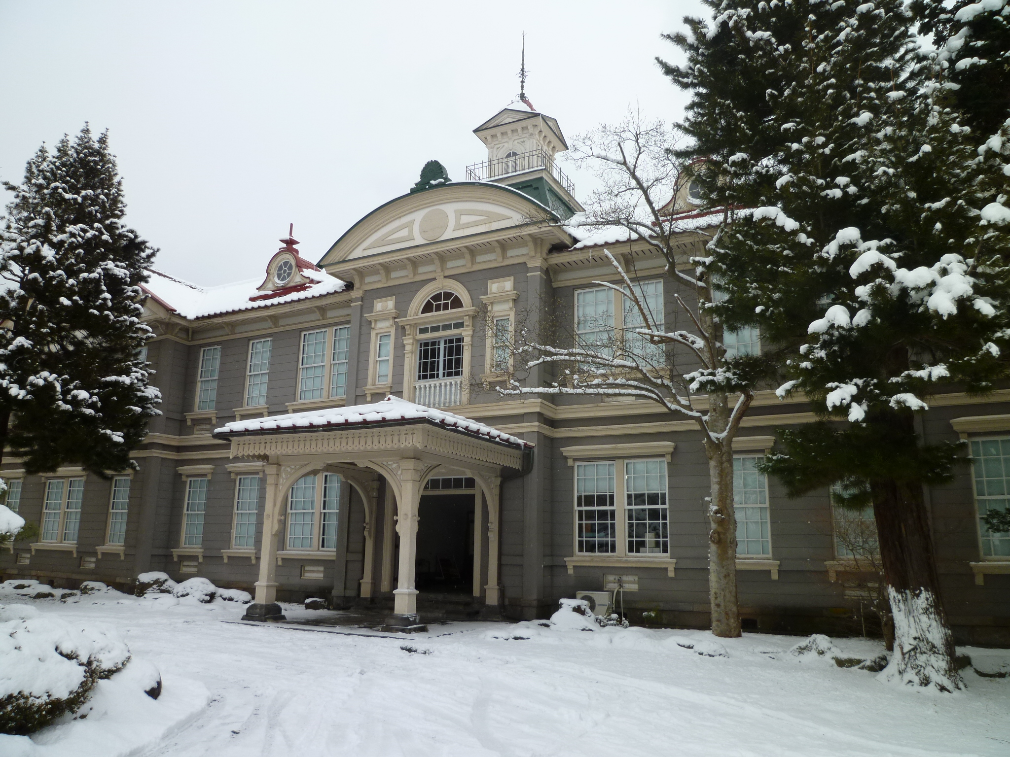 山形県立博物館分館教育資料館。明治34（1901）年建築の旧山形師範学校本館。国の重要文化財。経済産業省・近代化産業遺産。山形市緑町に所在。